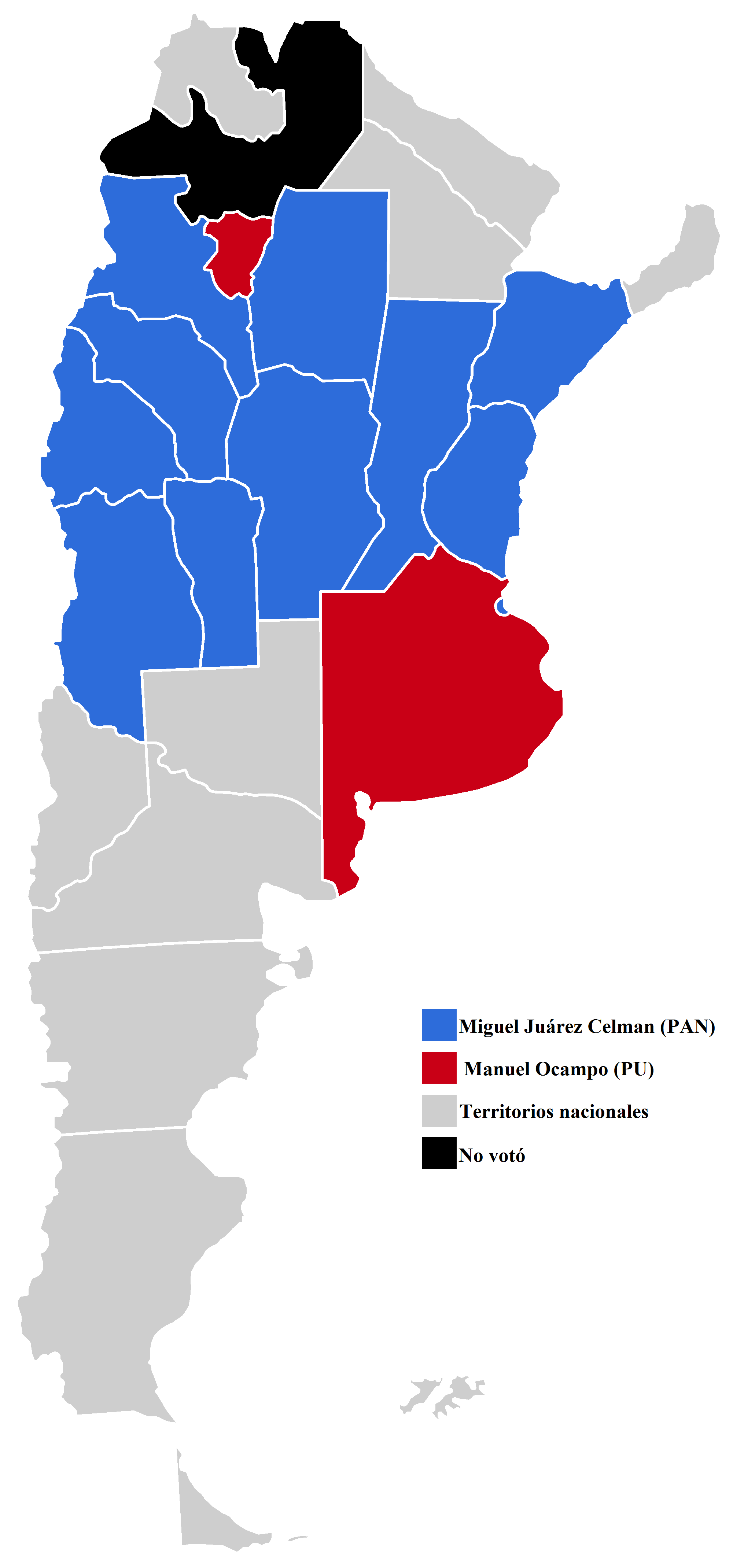 Resultado de la elección presidencial argentina de 1886 por provincia.